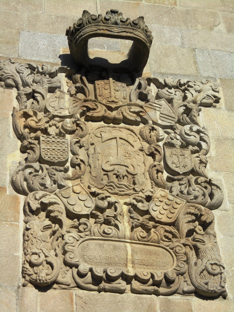 Gran Escudo del Palacio de Gago-Tavares en Pontevedra capital